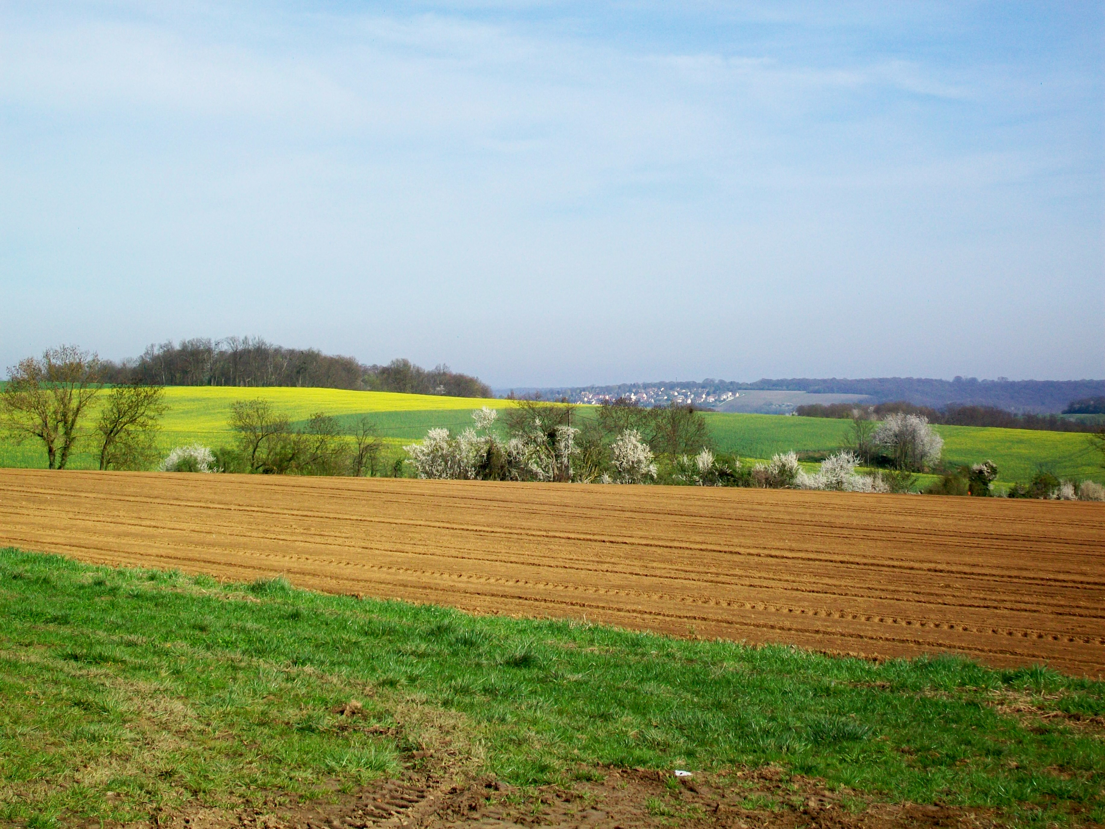 Vue en direction de la vallée d'Ysieux, derrière la première ligne d'horizon, avec les maisons du nouveau quartier de Chaumontel et la forêt d'Orry au fond.